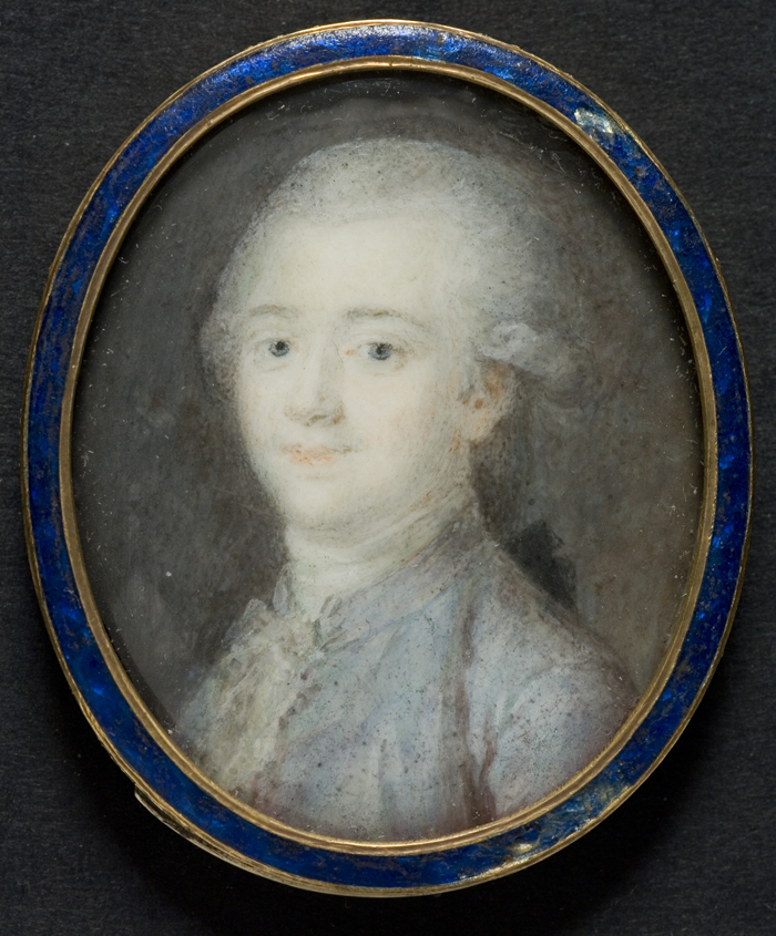 Portræt af T. Adeler, gouache på elfenben